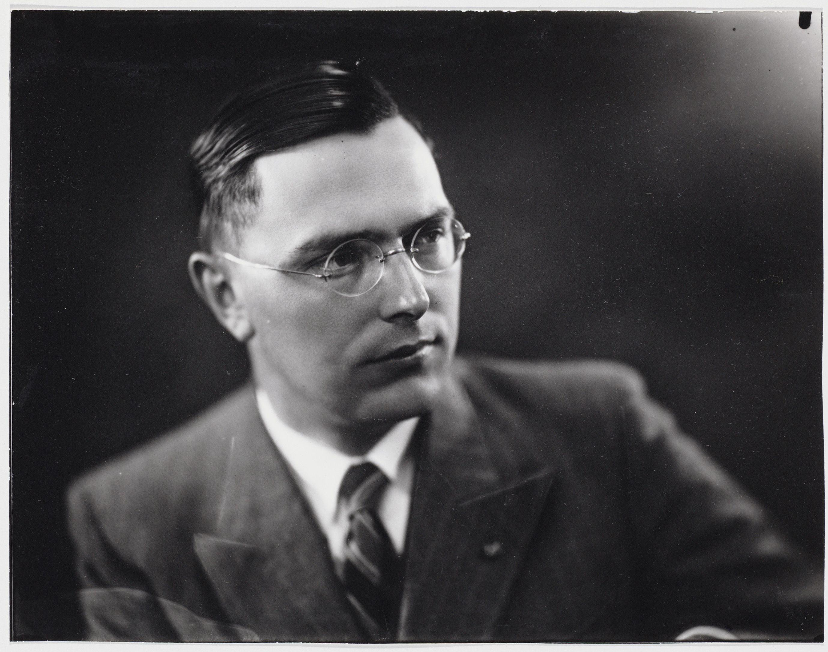 Beschrijving Dr. Machgielis Euwe (1901-1981) Wereldkampioen schaken. Documenttype foto Vervaardiger Merkelbach, Atelier J. Collectie Collectie Atelier J. Merkelbach Inventarissen Afbeeldingsbestand B00000002109 Generated with Dememorixer